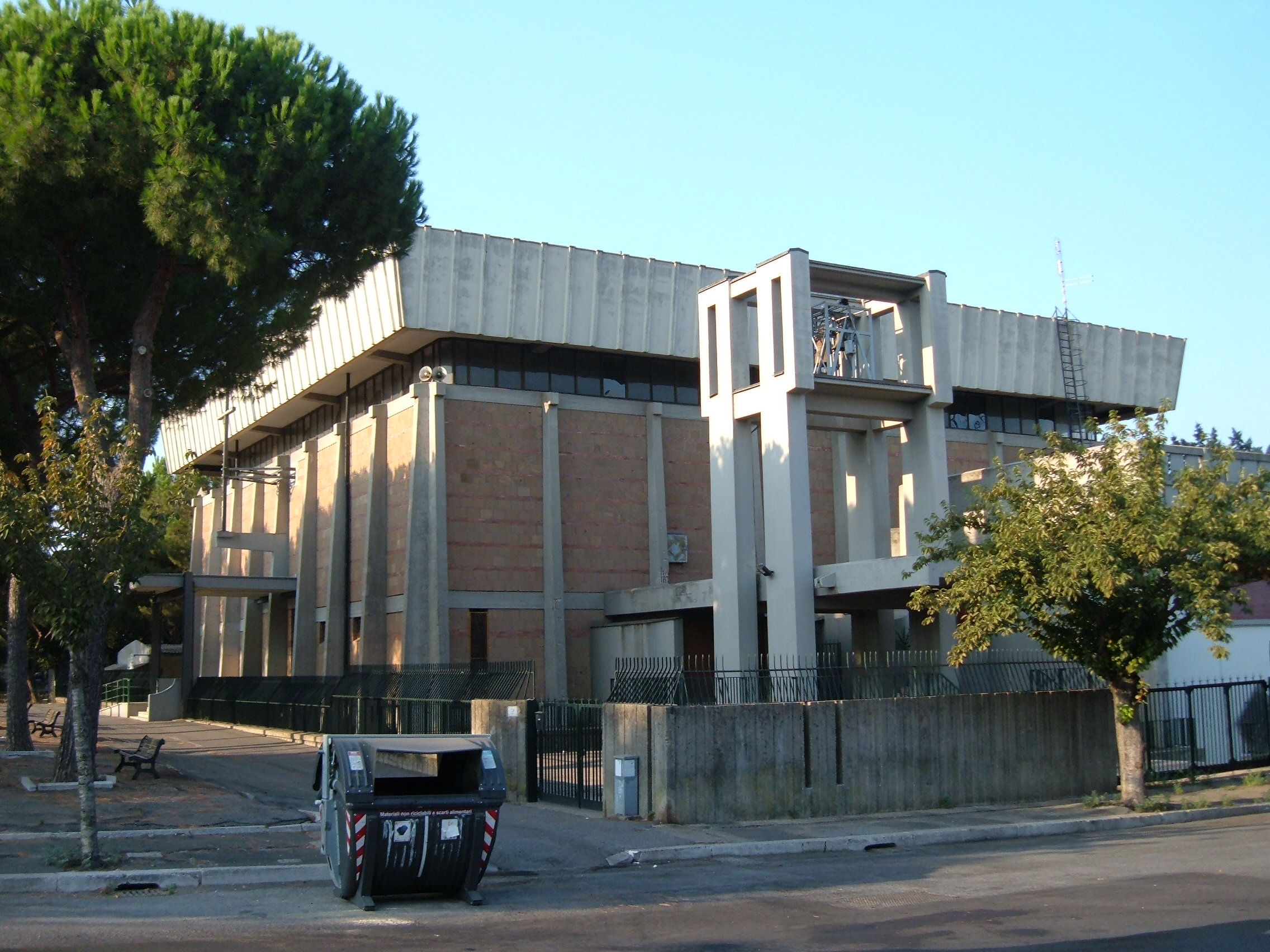 Chiesa di San Giuseppe Cafasso, a Roma, nel quartiere Tuscolano.